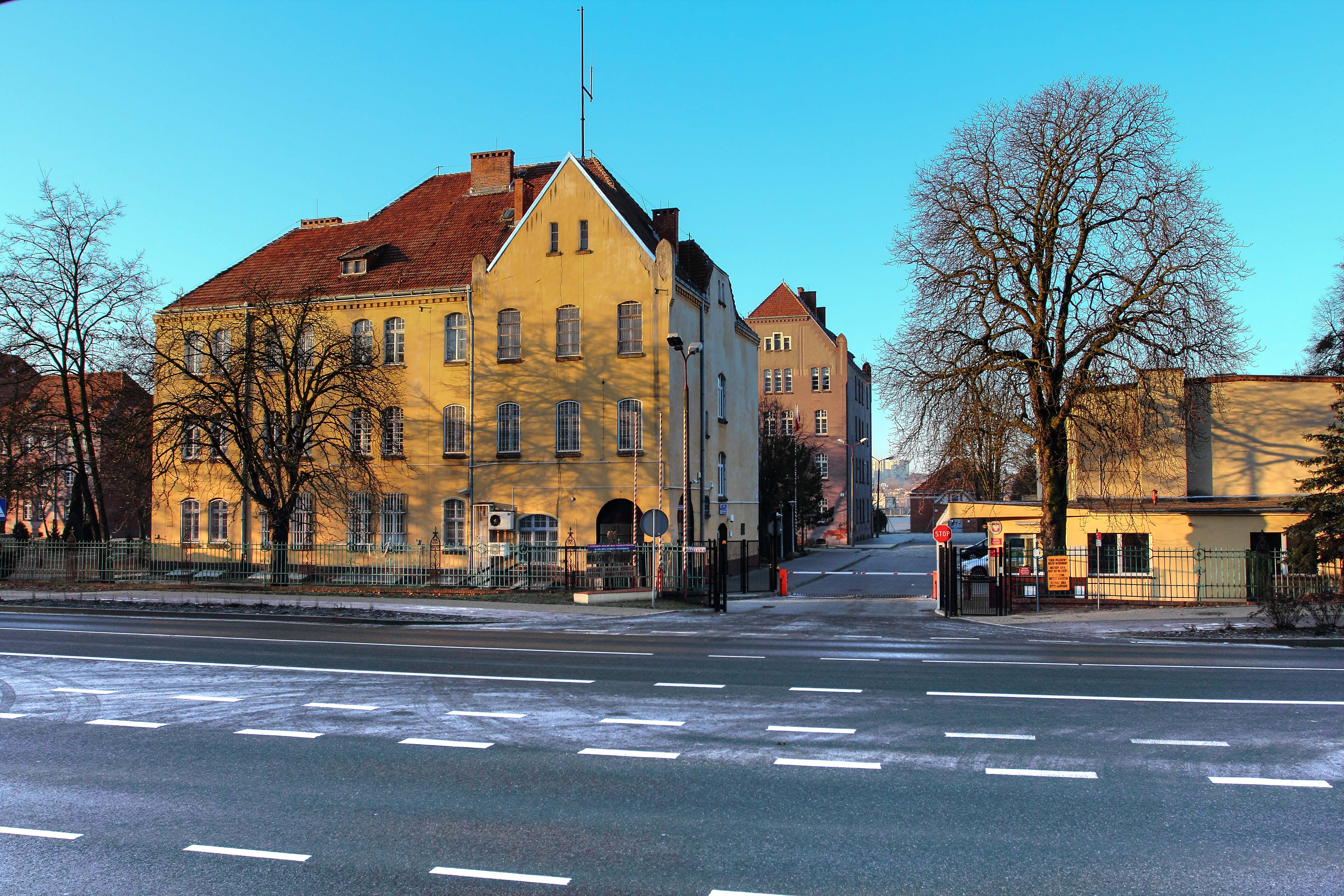 Grudziądz, ul. Hallera - brama główna koszar